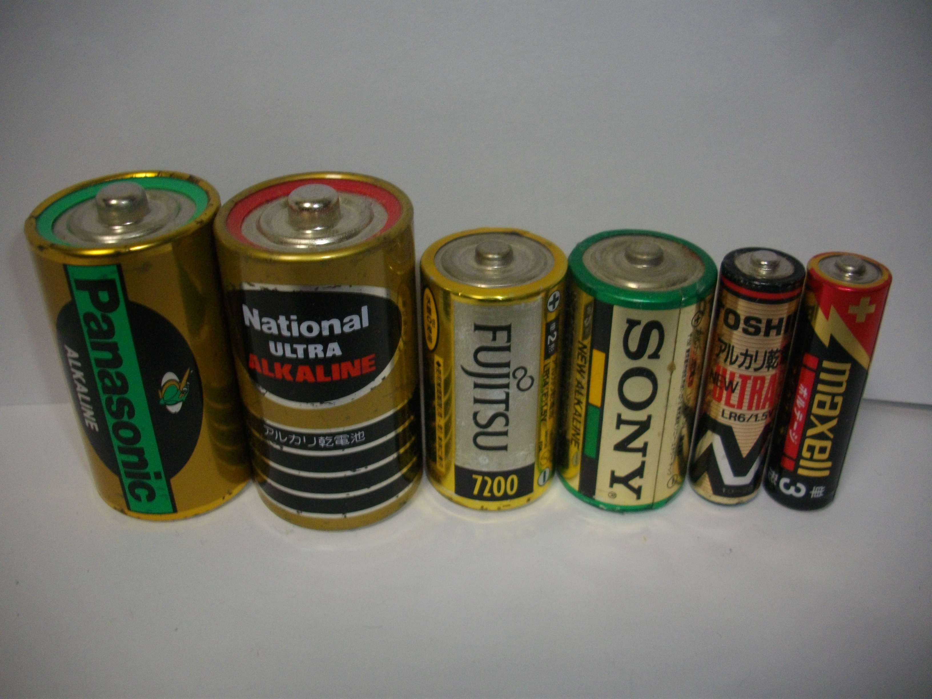 アルカリ電池。単1、単2、単3